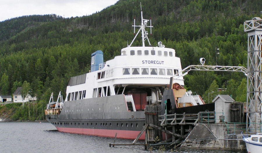 motor-ferry Storegut, Tinnoset, Norway, Rjukanbanen